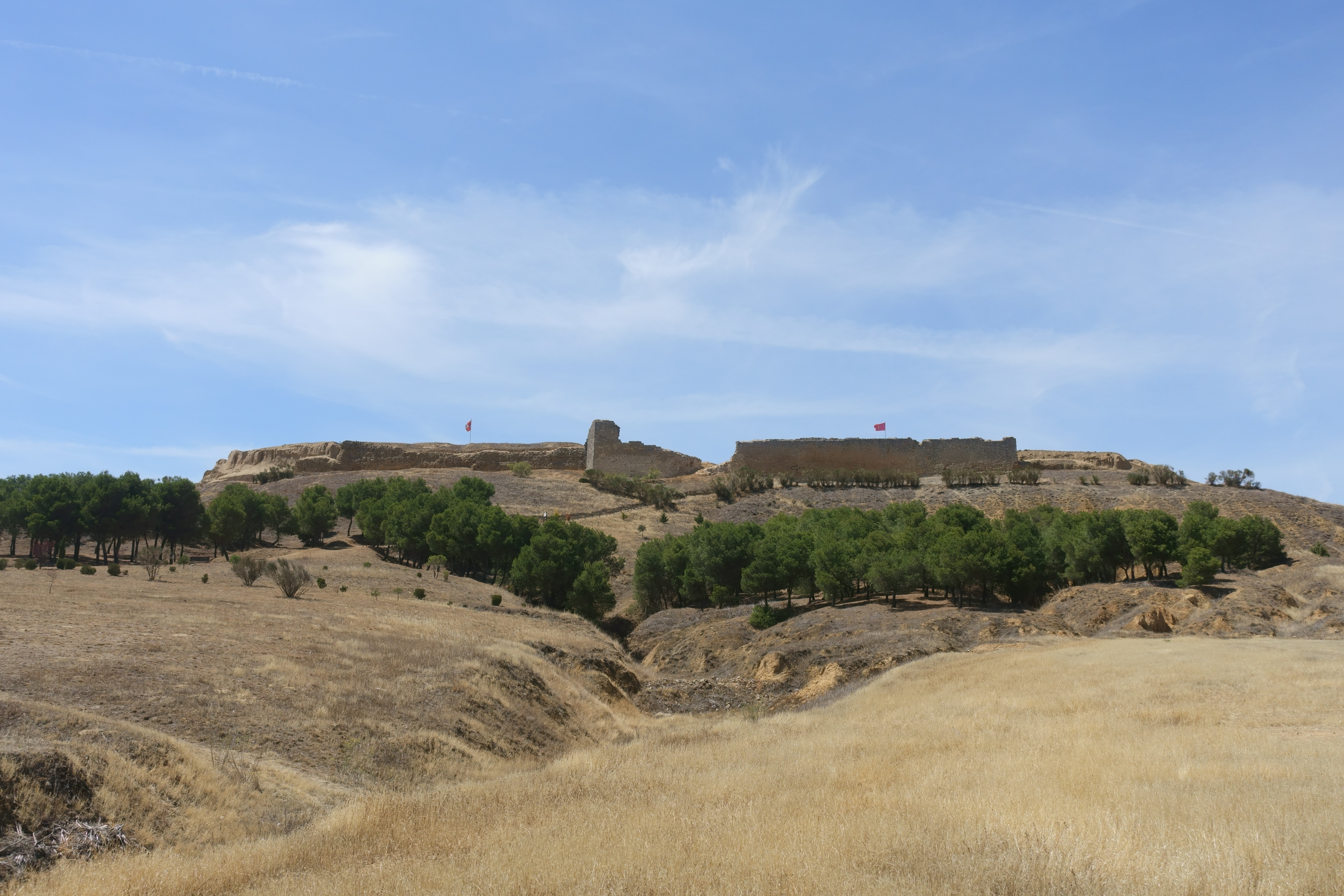 Vista del castillo de Tordehumos (Valladolid, España) desde las afueras de la población.